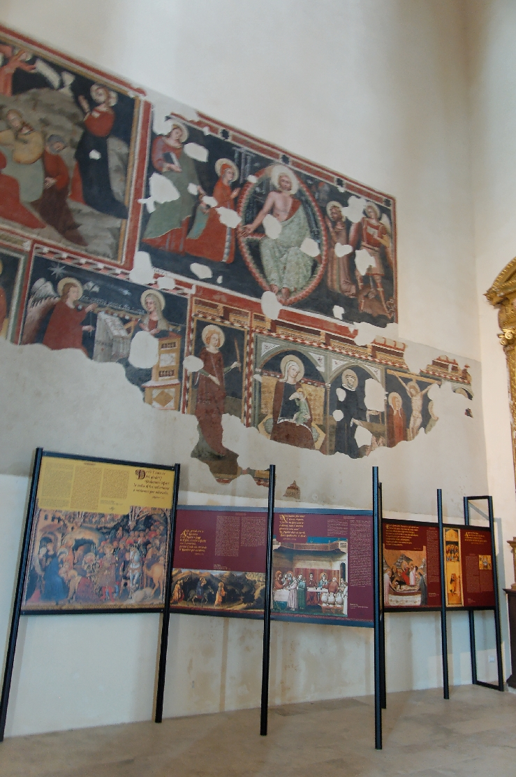 Atri 2011